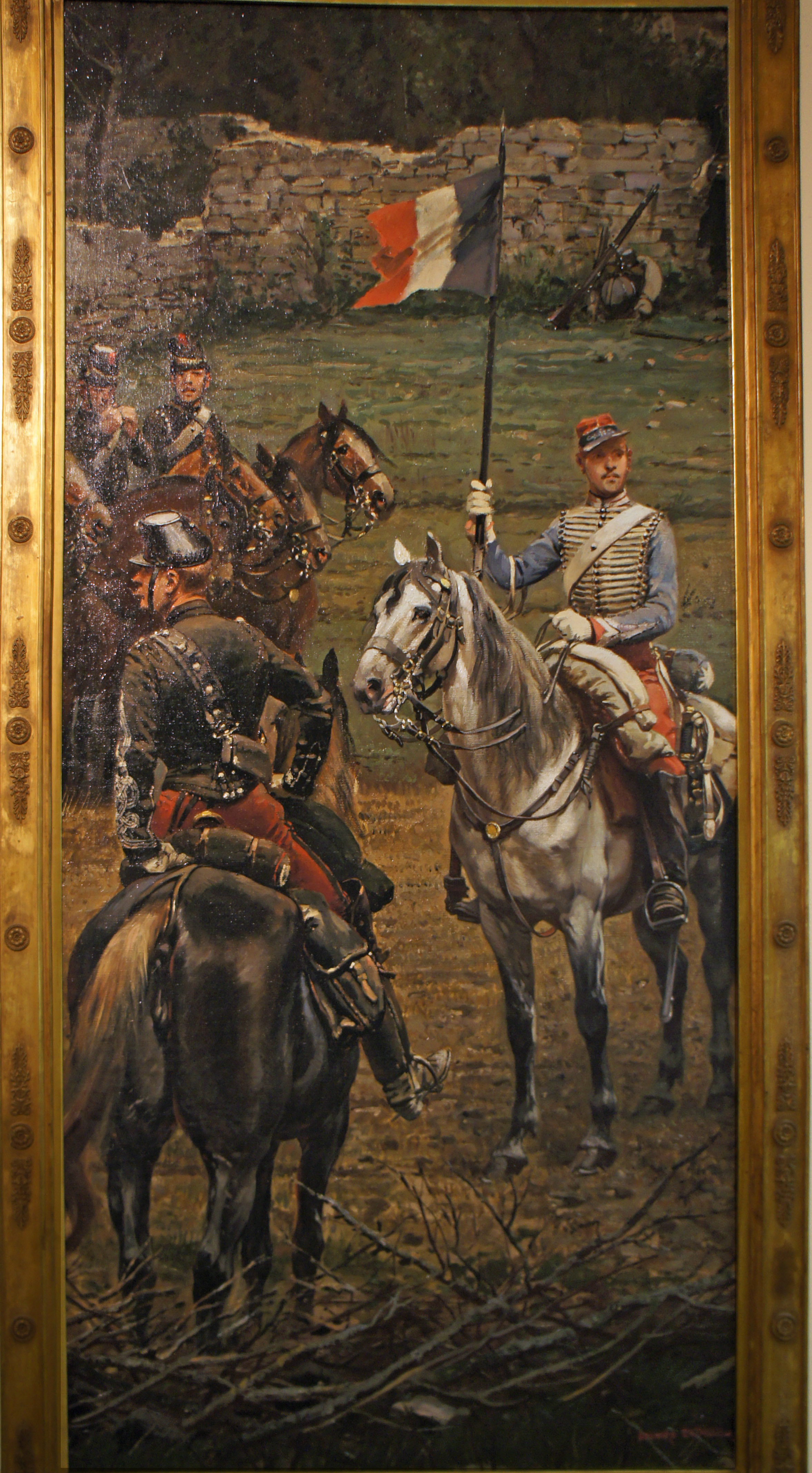 fragment de la Bataille_de_Rezonville 16 août 1870 à droite le maréchal des logis du 1er hussards, porte fanion du général Canrobert; à gauche le capitaine du 6e chasseurs à cheval commandant l'escorte de l'état-major du 6e Corps d'armée.